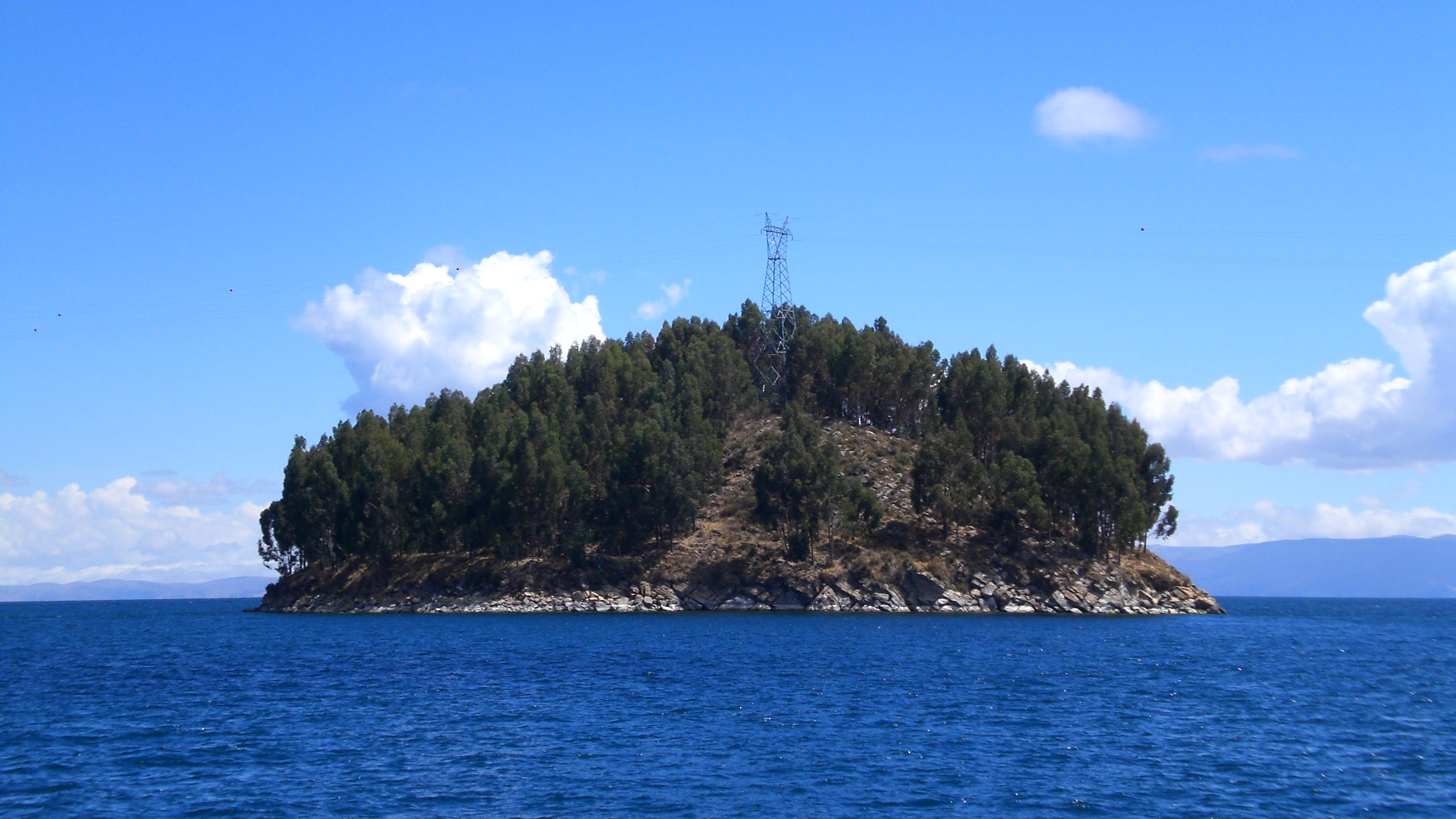 Isla Chelleca ubicada en el estrecho de Yampupata del lago Titicaca, Departamento de La Paz, Bolivia.